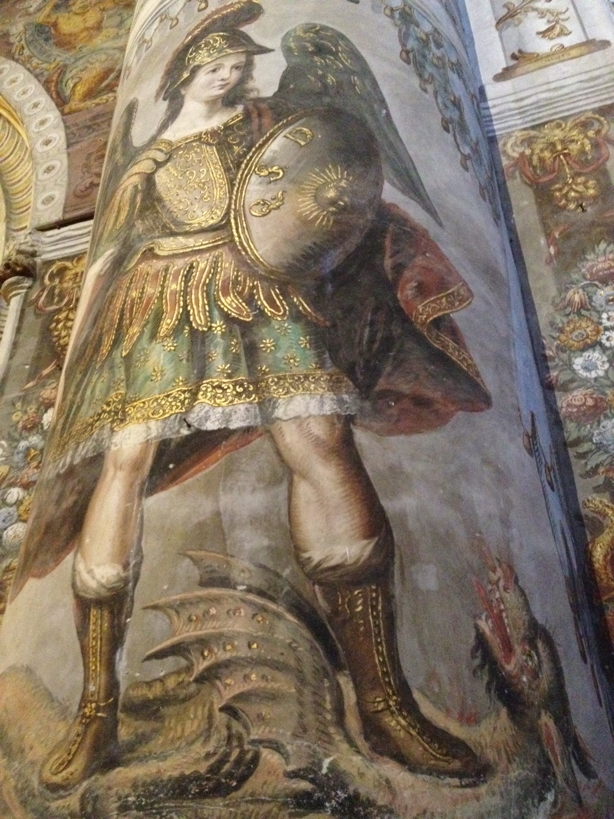 San Miguel, detalle de una de las columnas de la iglesia del Monasterio de San Jerónimo (Granada)